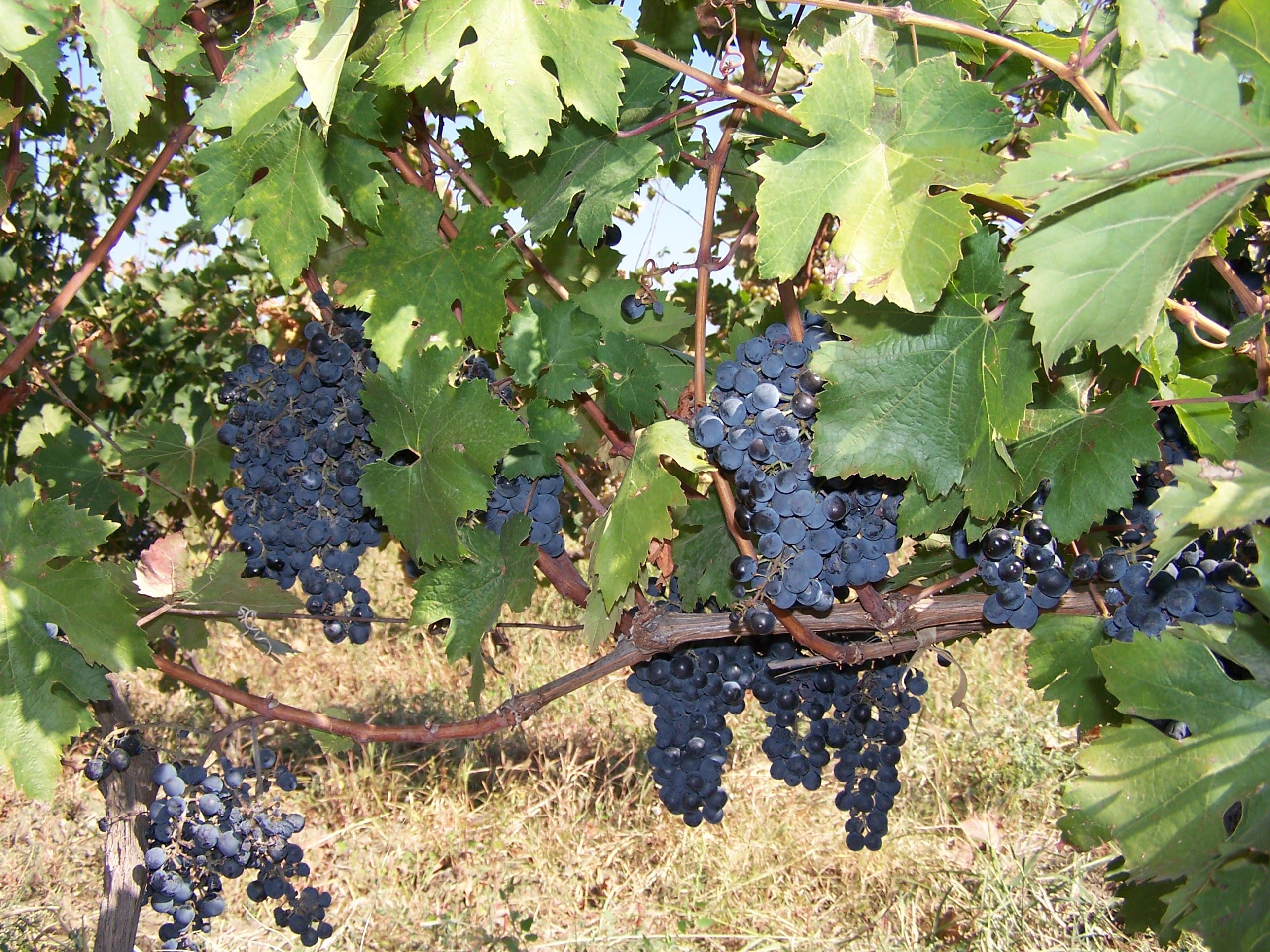 Rtveli--Vintage in Kakheti